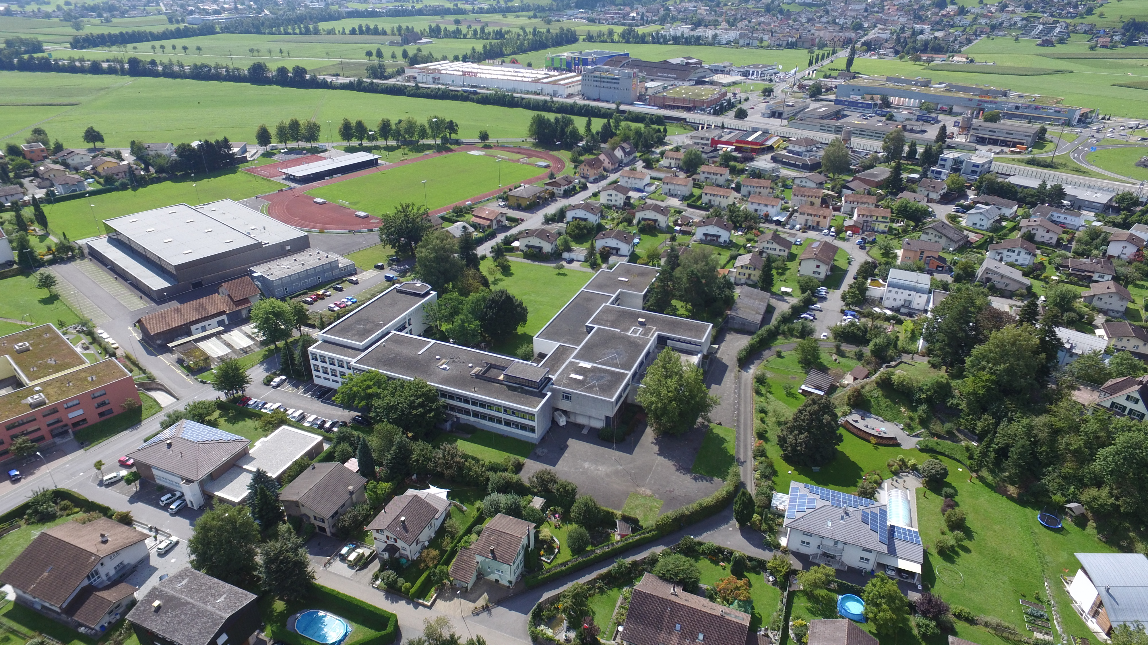 Luftaufnahme der Kantonsschule Sargans